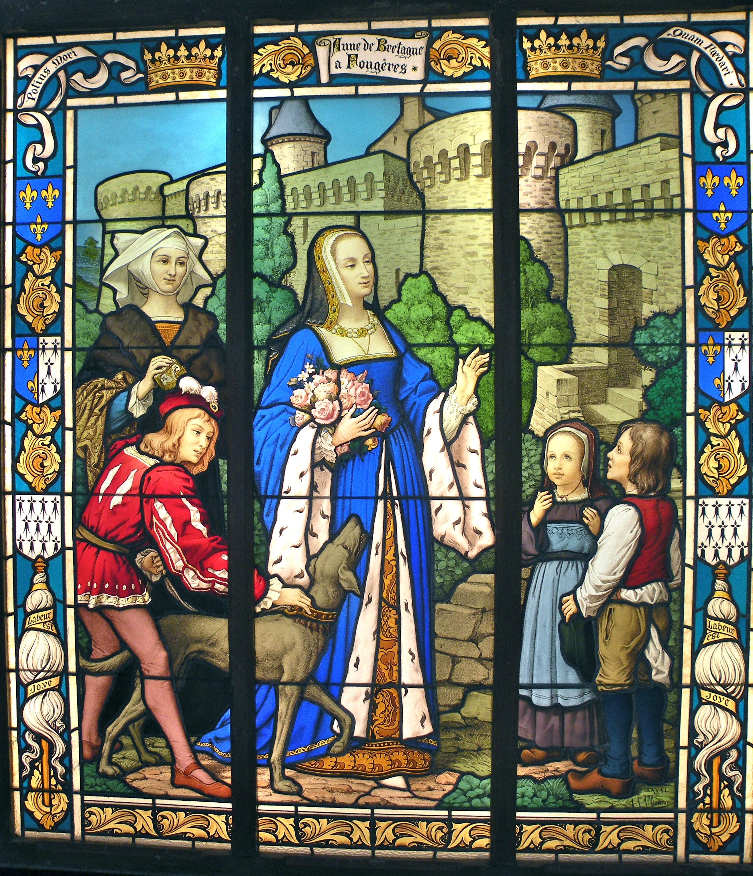 Vitrail d'Anne de Bretagne à Fougères.